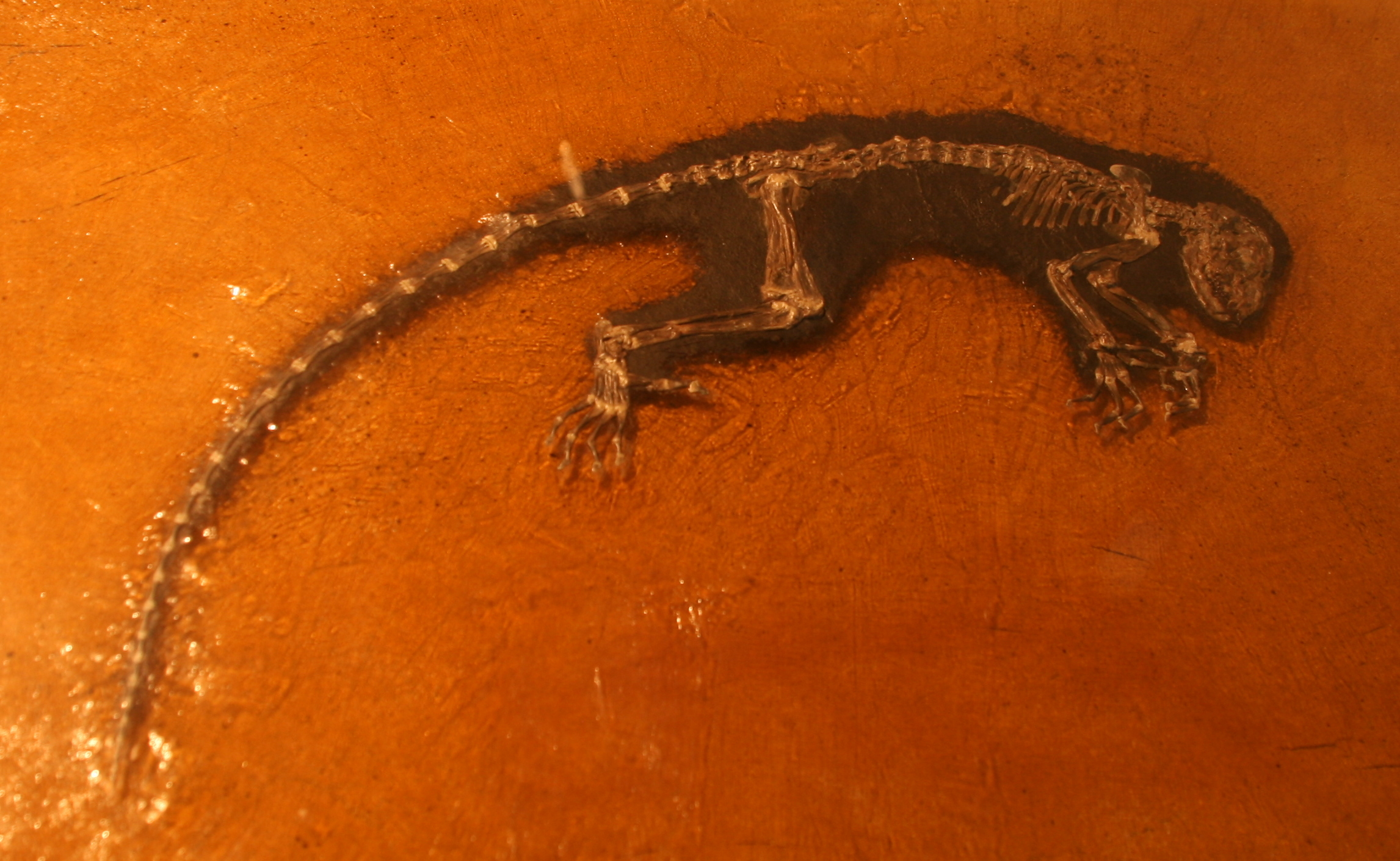 Darwinius masillae Replica of one of the plates of the early haplorrine Darwinius masillae, also known as "Ida". Donation: Senckenberg Forschungsinstitut und Naturmuseum